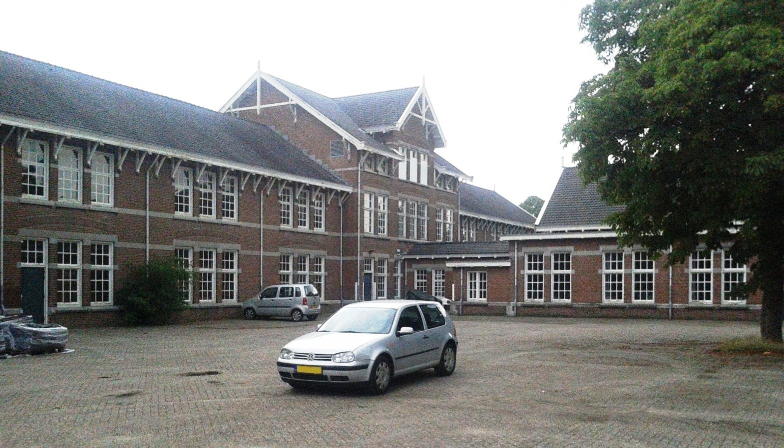 Van Essenkazerne Ede